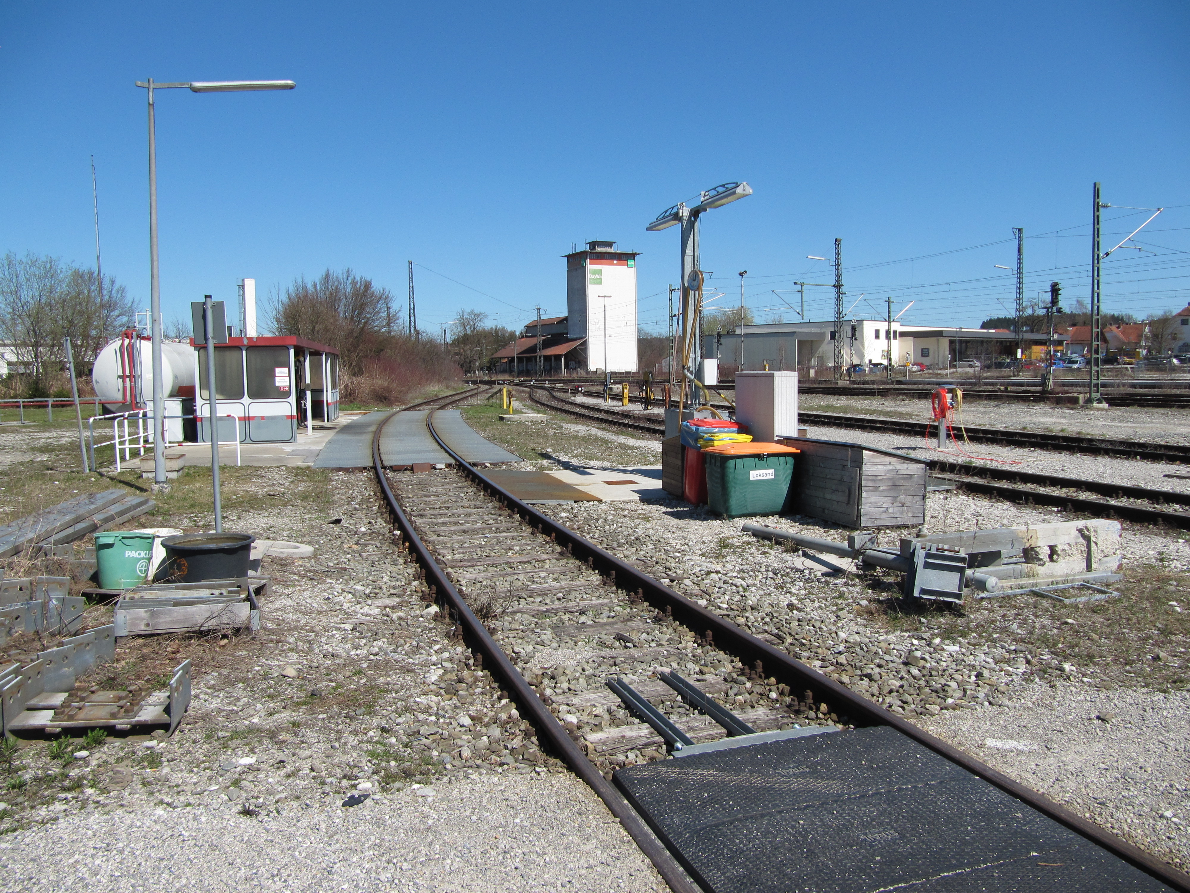 Bahnhof Weilheim mit Tankstelle auf dem Stumpfgleis und Stellwerk im Hintergrund